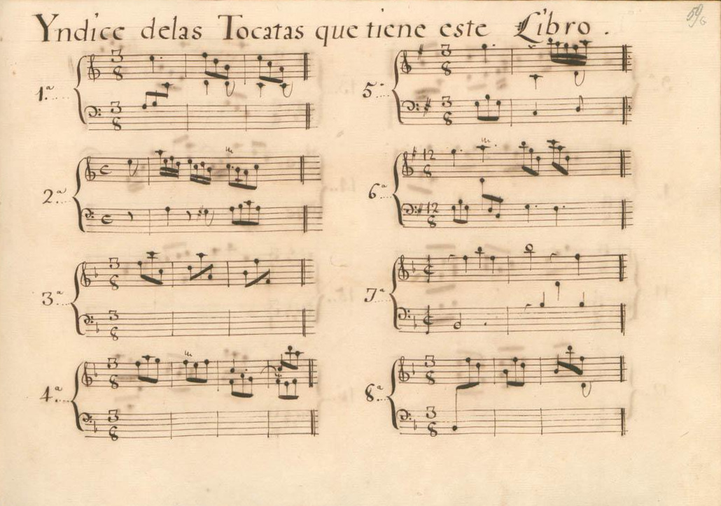 Première page de l'index (folio 59) avec l'incipit des huit des premières sonates K. 148 à 155 de Scarlatti. Ici, le manuscrit substitue le terme sonate à Toccata qui désigne au début du XVIIIe siècle encore une sorte d'étude pour le clavier.